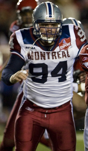 Eluding Defenders